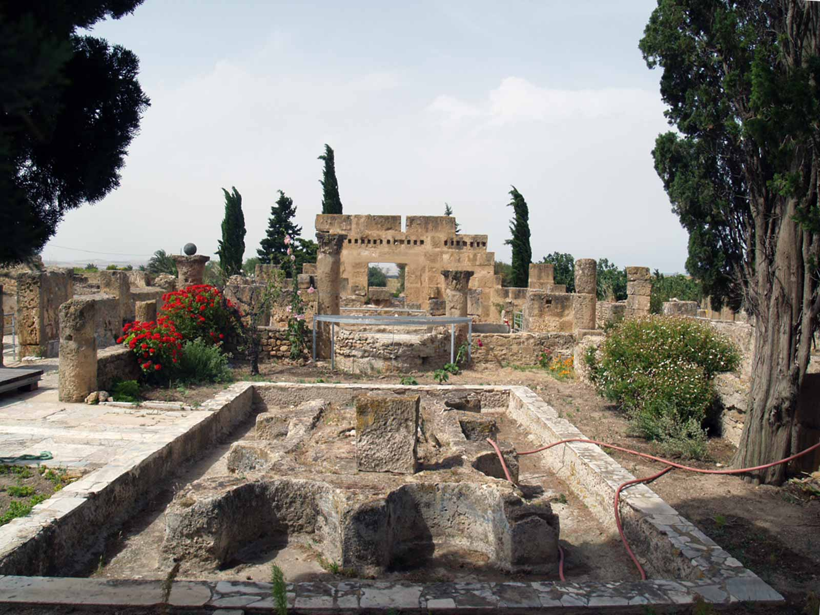 Fontaine de la tortue, Utique